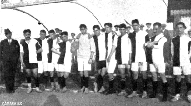 Primer equipo del Vigo Foot Ball Club, antecedente lejano del Celta de Vigo, en septiembre de 1912.